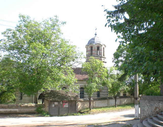 Църковният храм на село Еленово, Поповско - 2007 год.